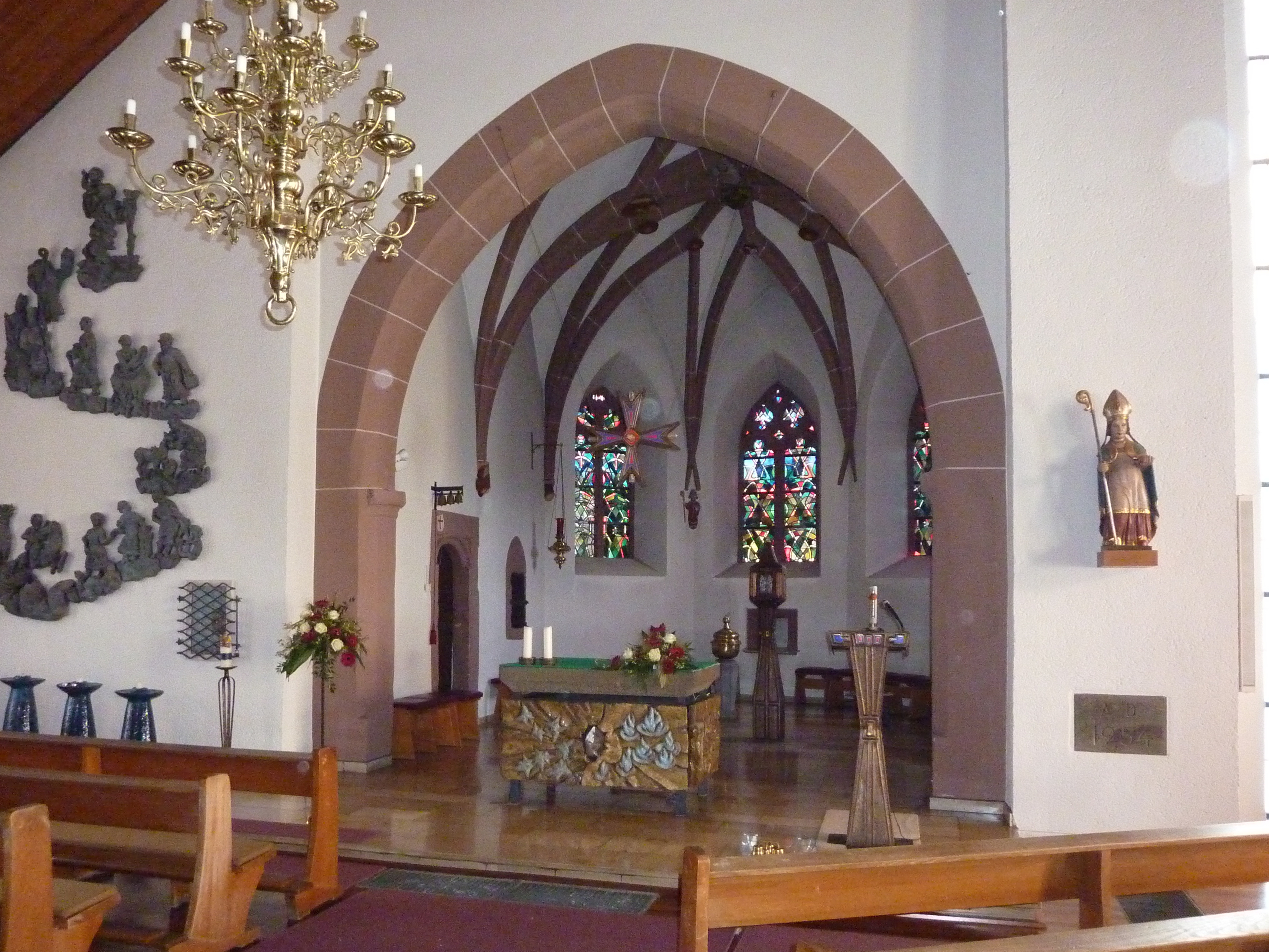 Berk, Schleidener Str. 9, Kath. Pfarrkirche, Chor